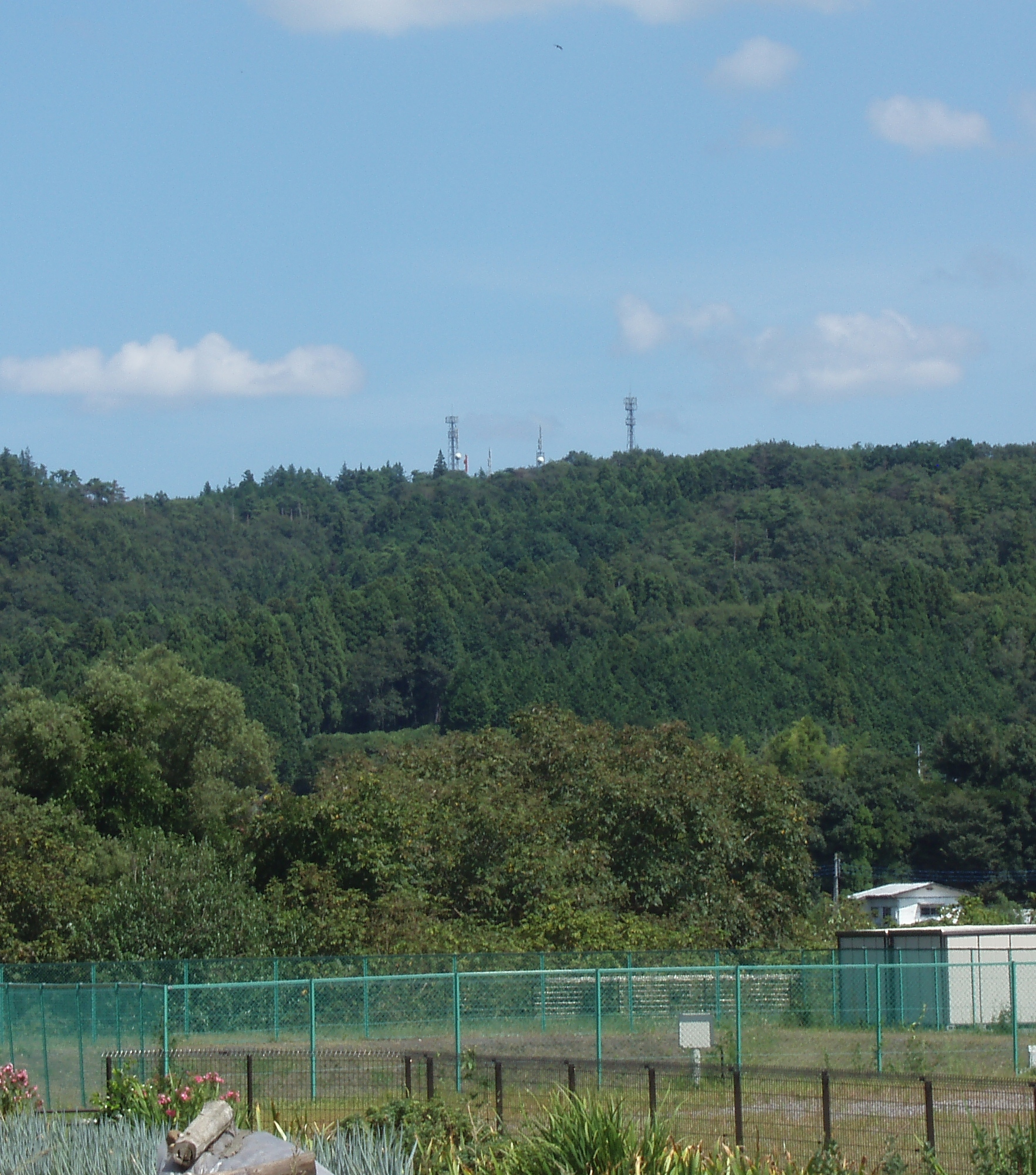 栃木県馬頭中継局(294号線より撮影)